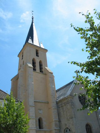 Description: Brunoy, Église Saint-Médard Source: Utilisateur:vinbaron Licence